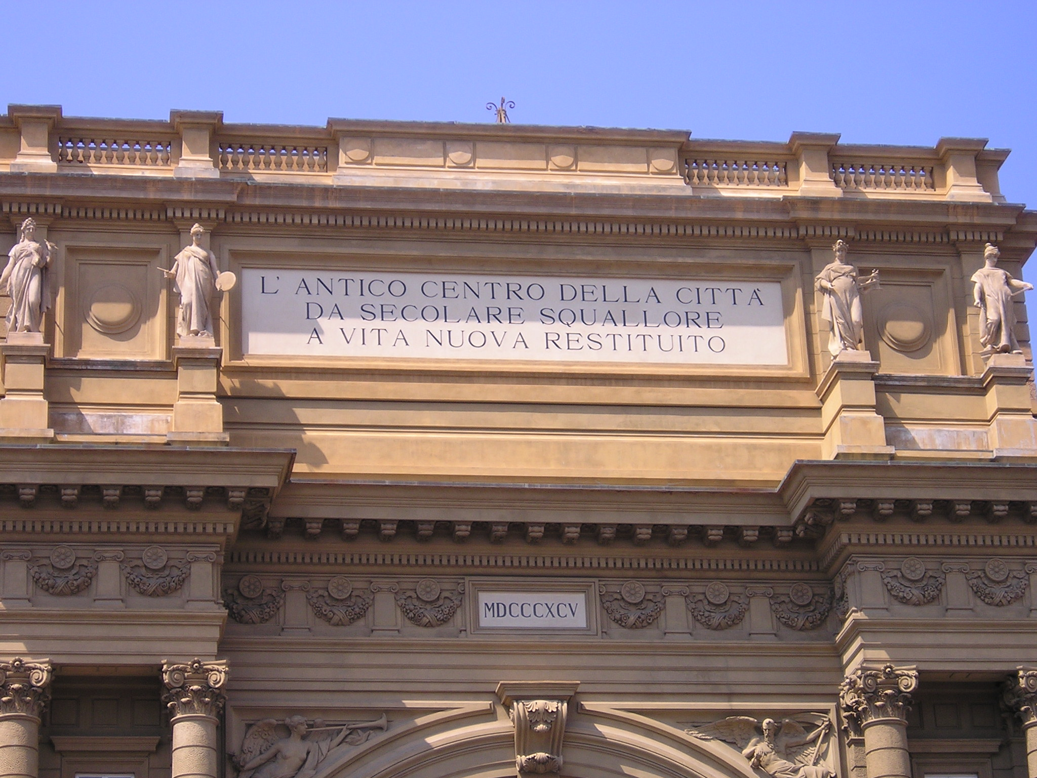 L'autore di questa immagine è Luigi-CC, e la rilascia nel pubblico dominio.